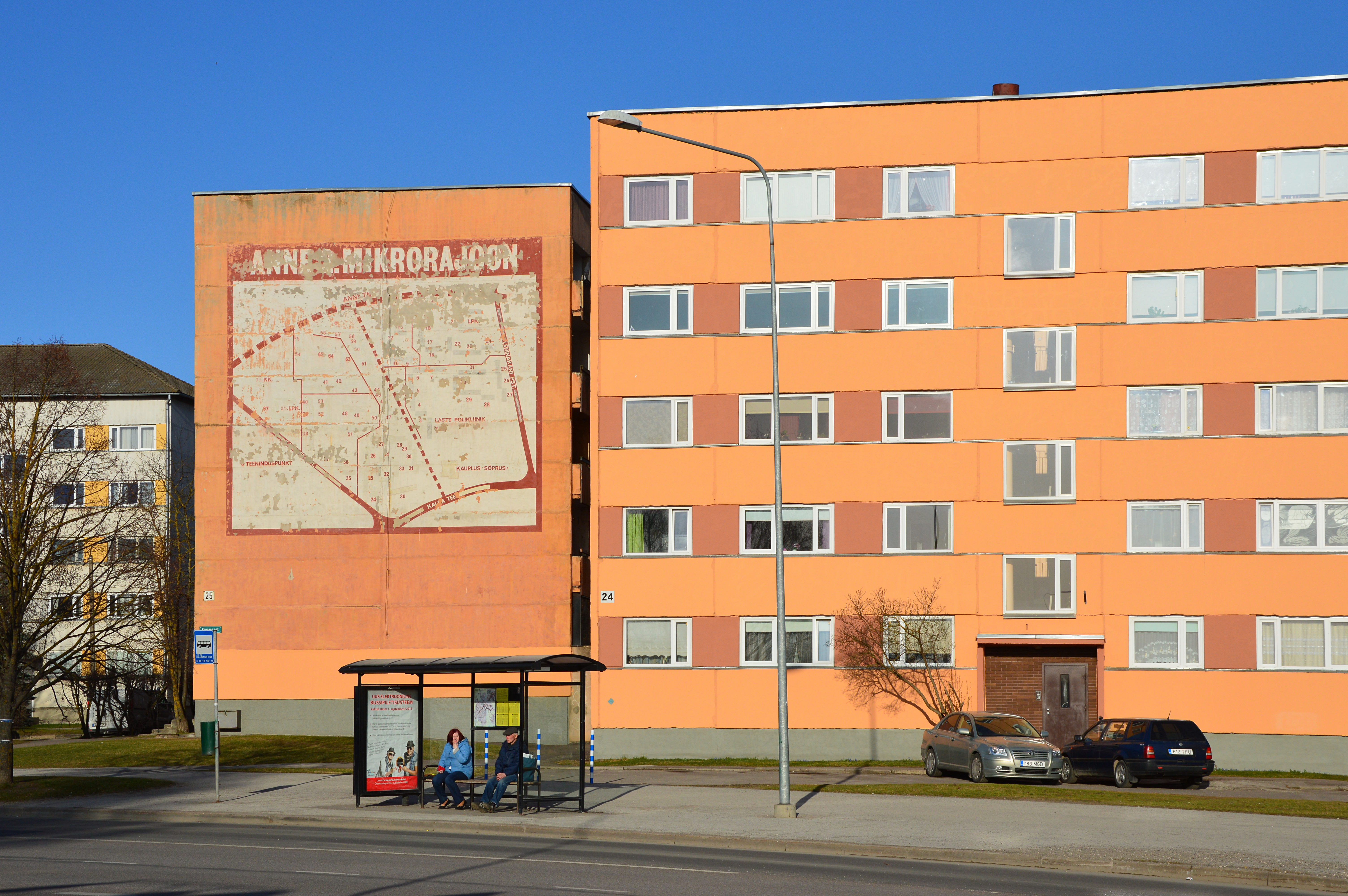 Kaunase pst 24 ja 25, Tartu.